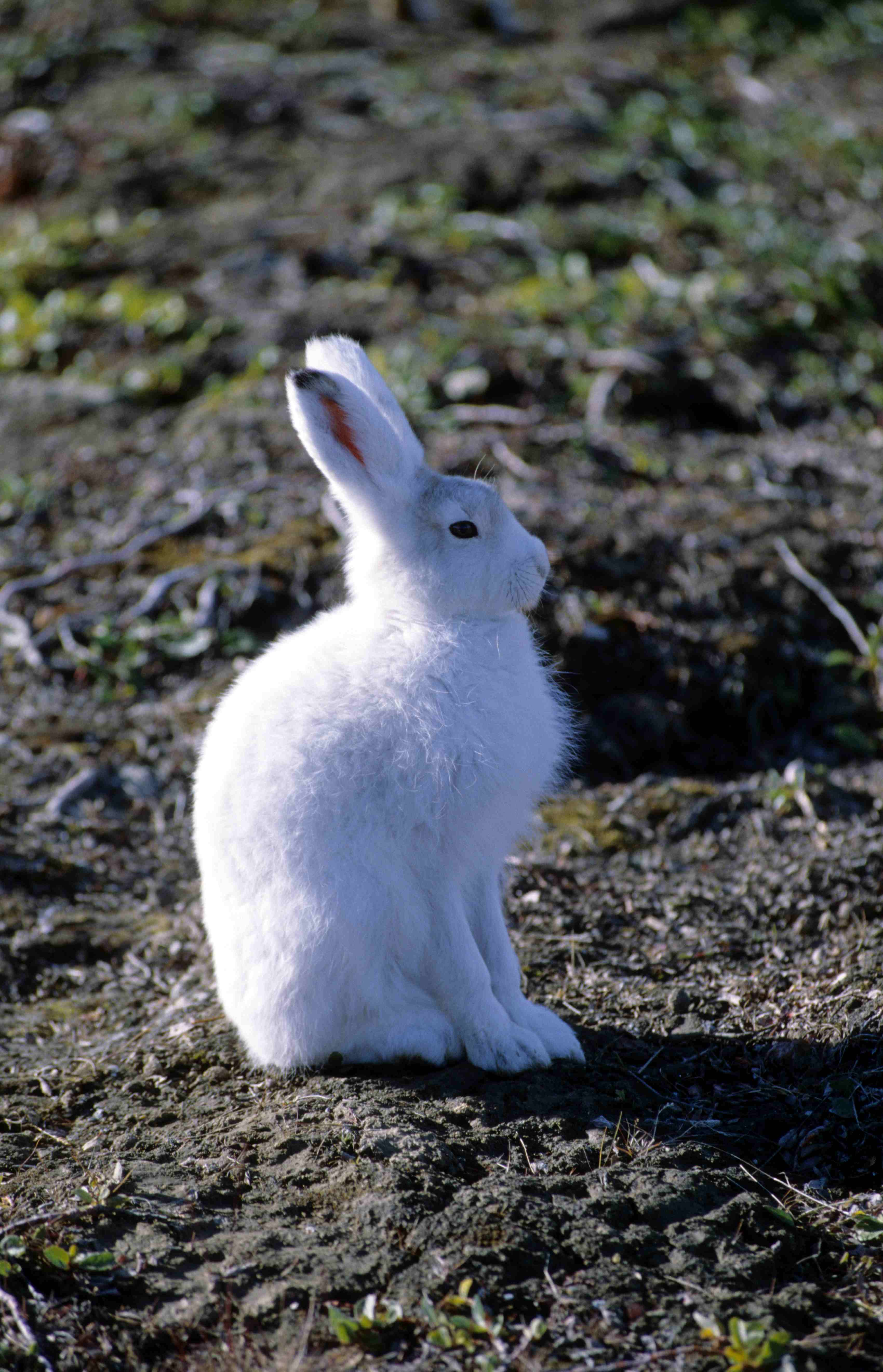 Arctic Hare (Ellesmere Island, Nunavut, Canada)